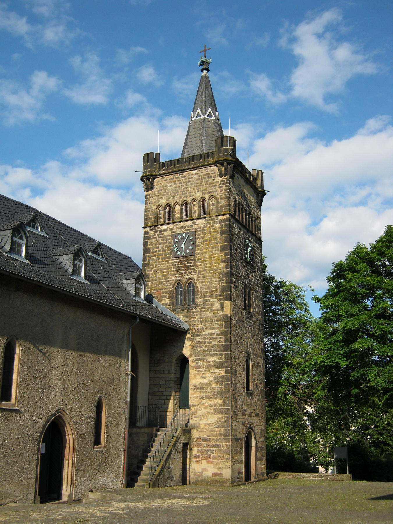 Deutschherrenkapelle